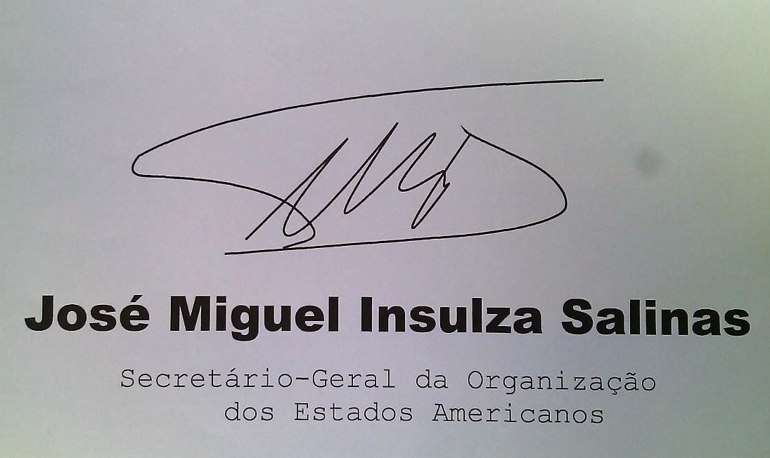 Autógrafo vetorizado de José Miguel Insulza.